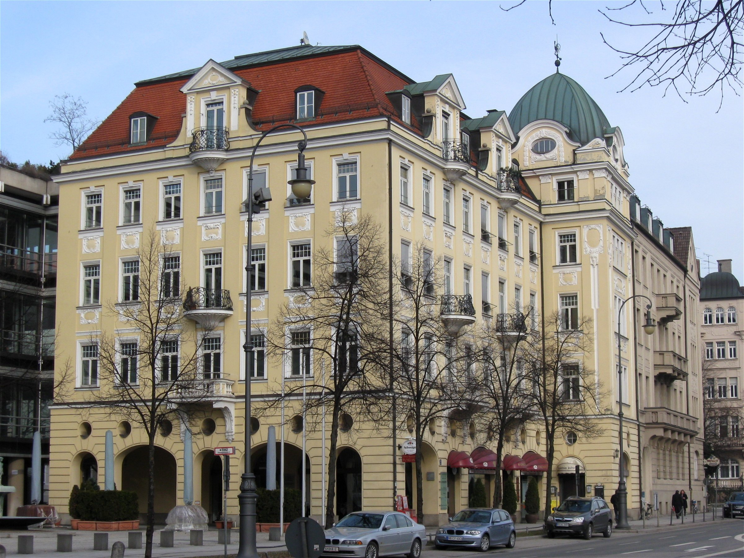 Prinzregentenplatz 11; Mietshaus, barockisierender Jugendstil, mit Kuppel und reichem Stuckdekor, 1901-02 von Architekturbüro Rupp & Fuchs, nunmehr Hans Hartl; 1977-78 rekonstruierend umgebaut.